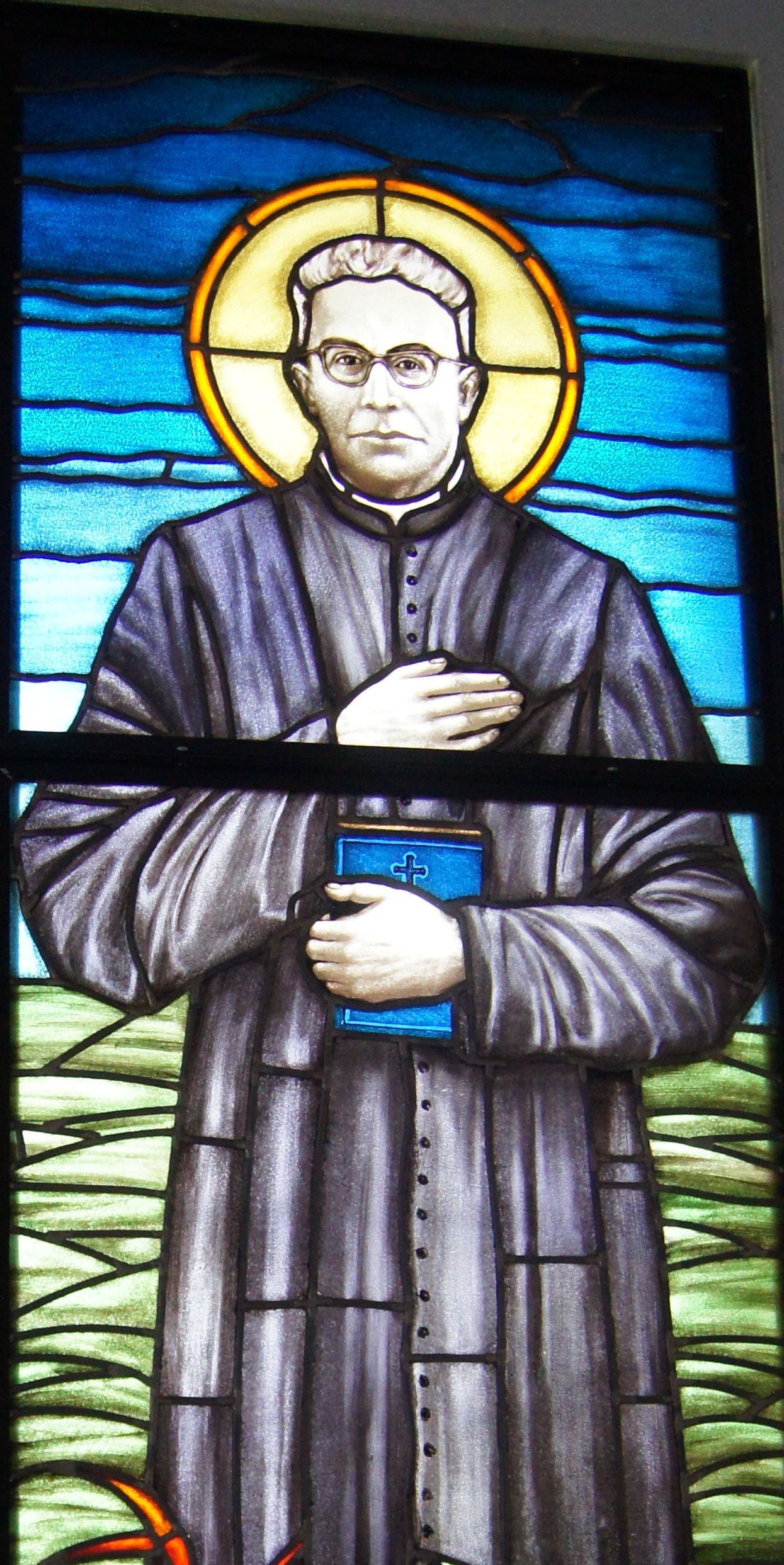 Witraż przedstawiający bł. Władysława Findysza w Kościele w Nowym Żmigrodzie